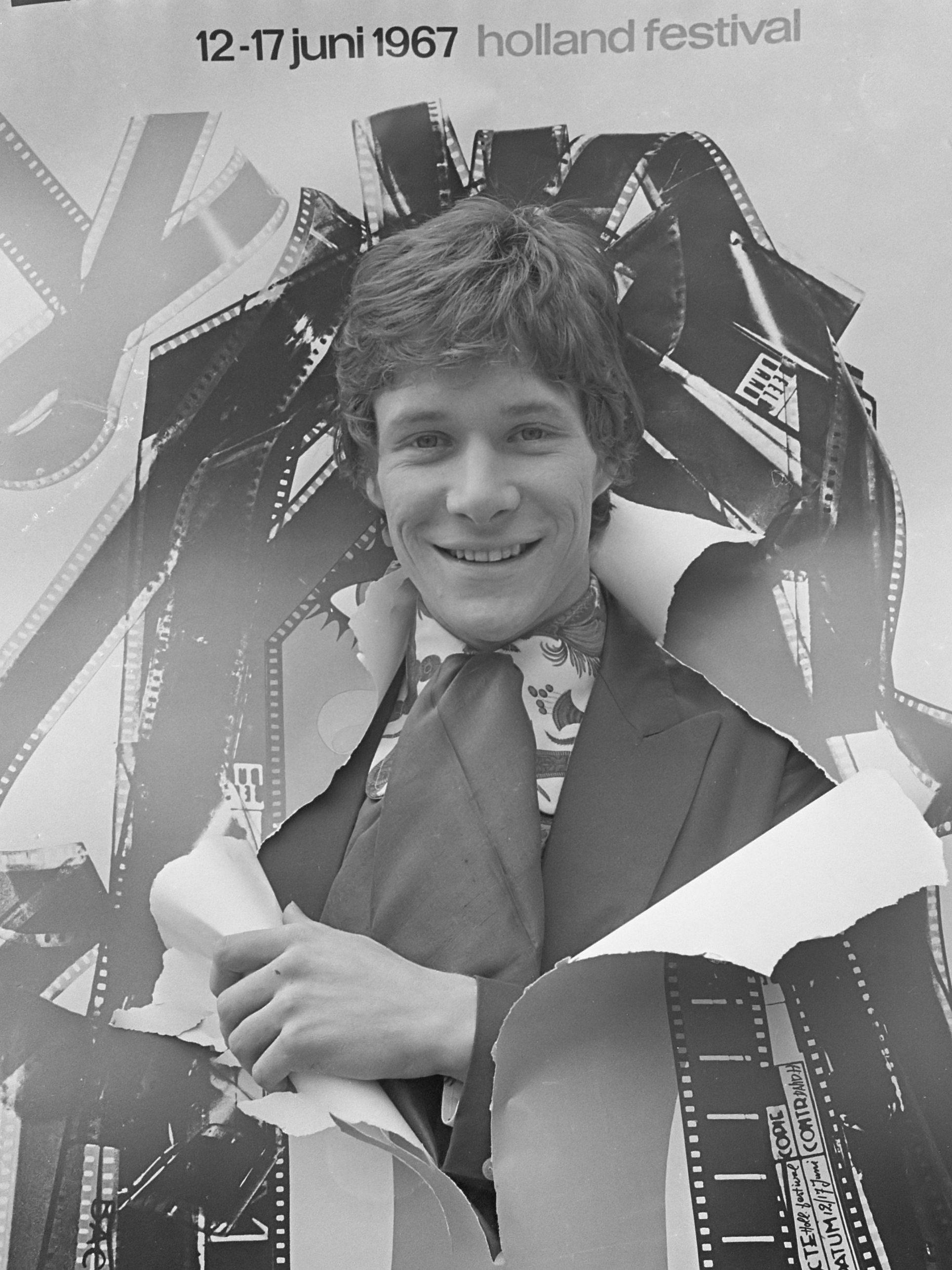 Filmweek in Arnhem. De acteur Paul Jones kijkt door een affiche 14 juni 1967